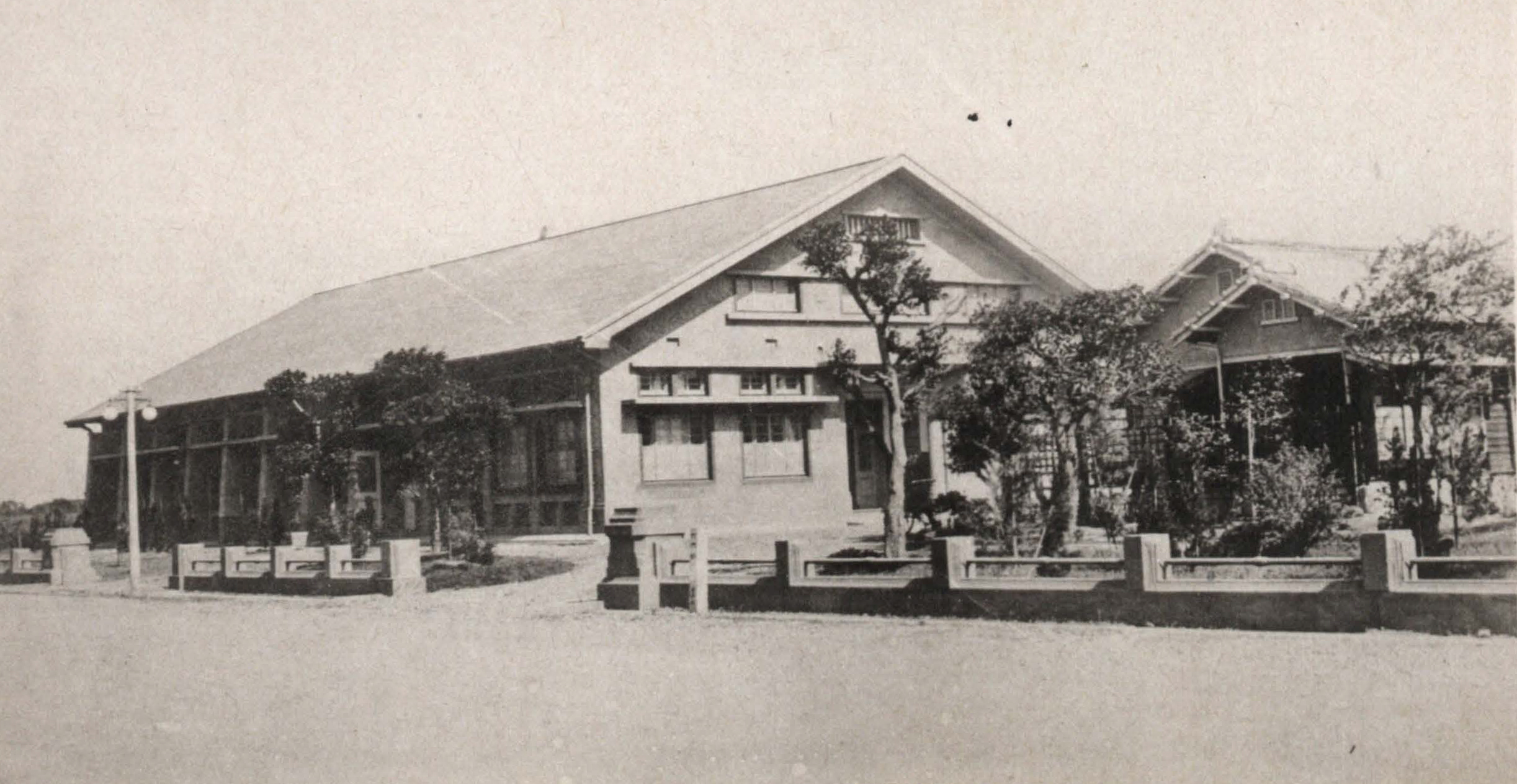 新營郡公會堂，翻拍自1939年的《新營郡要覽》